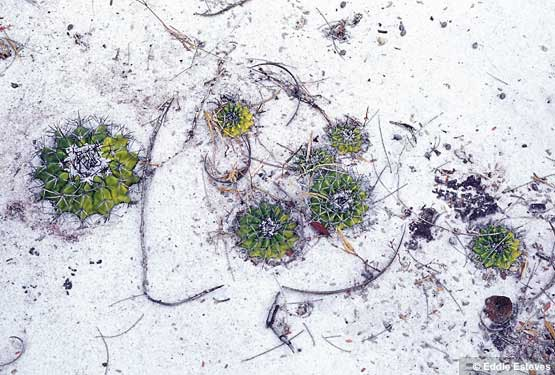 Discocactus insignis Grao Mogol Minas Gerais Brasil